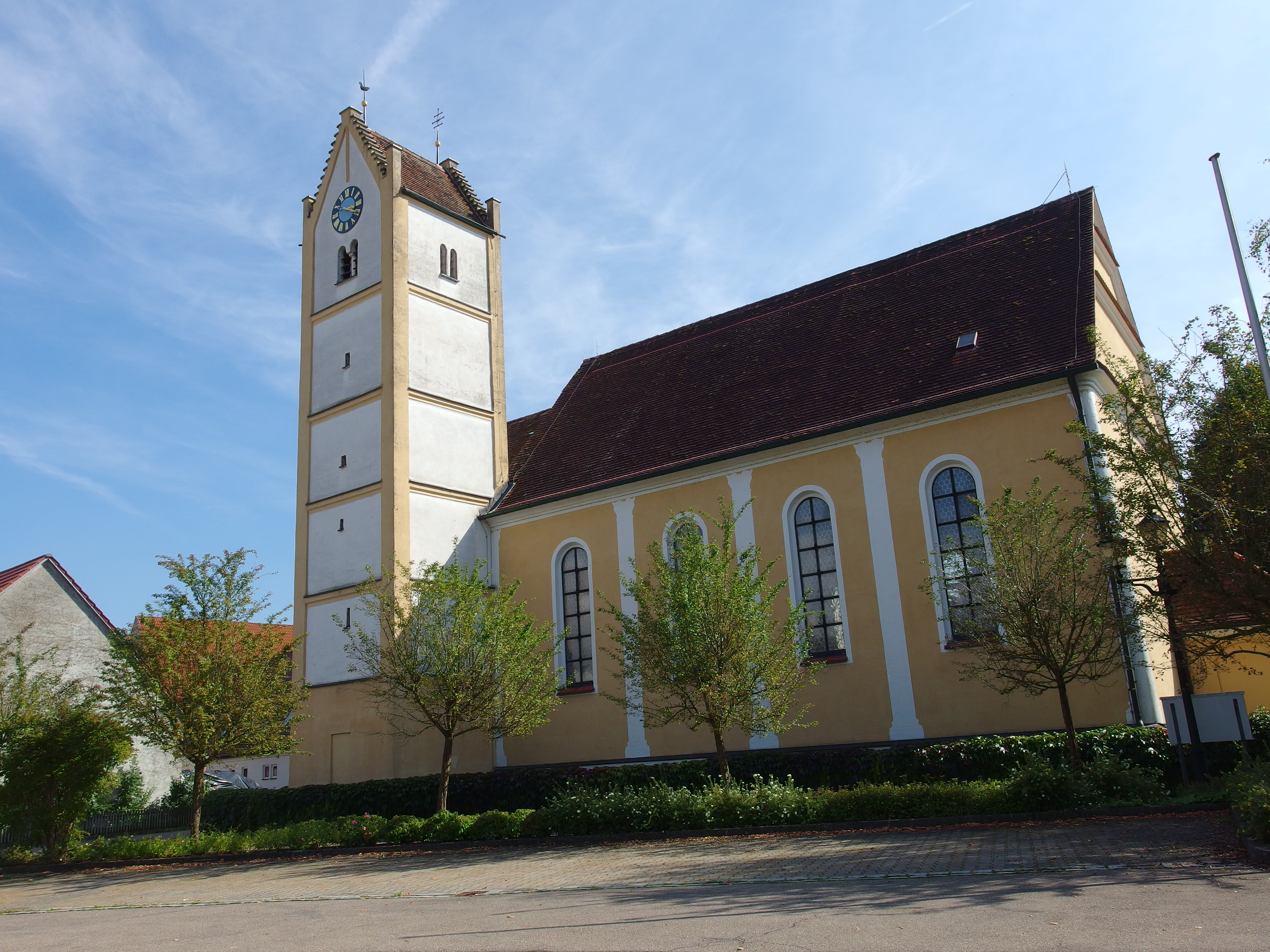 Genderkingen, Kirchplatz 1 Kath.Pfarrkirche St. Peter und Paul; von NordThis is a photograph of an architectural monument.